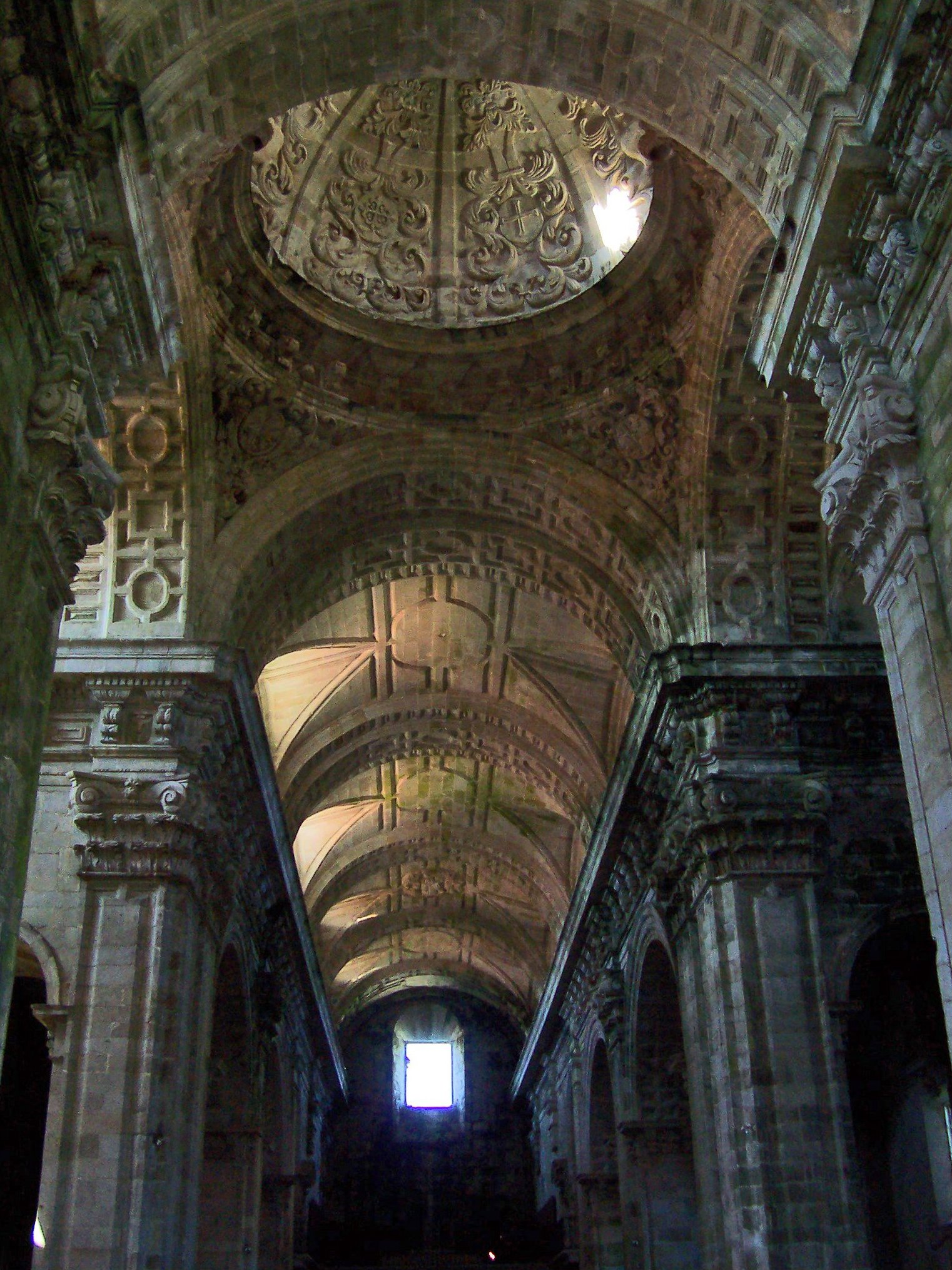 Sobrado dos Monxes Grande complexo que alcanzou o seu apoxeo nos s. XV e XVI. Abandonado no século pasado, foi novamente ocupado e restaurado dende finais dos anos 50. A igrexa actual é Barroca, do S XVII .Destacan as capelas da Madalena e a do Rosario, e a sancristía Renacentista (obra de Juan de Herrera). Os tres claustros, o da hospedaxe, o das procesións e o grande, a sala capitular, a súa espectacular cociña e o comedor, completan as principais estanzas.